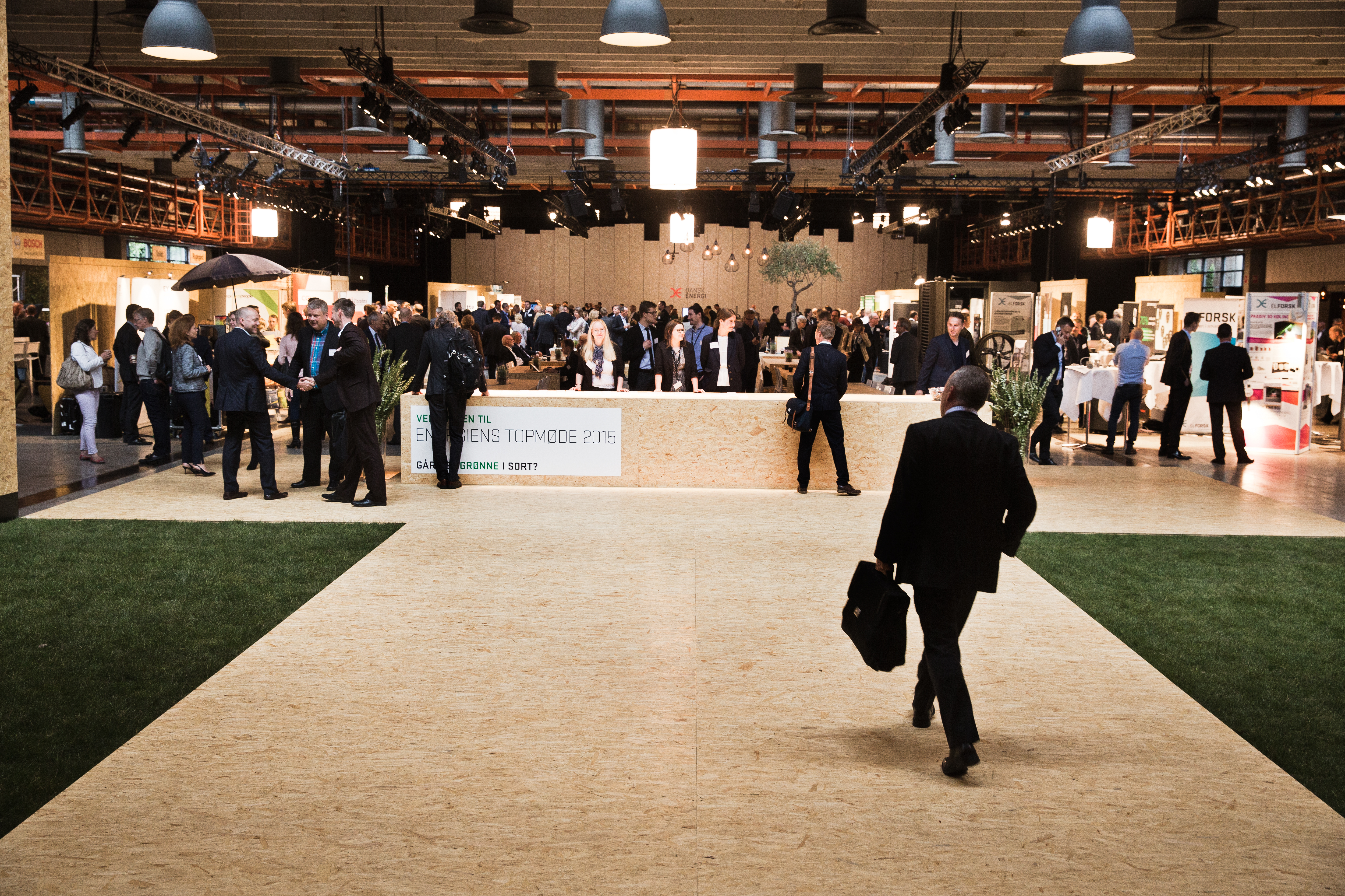 Dansk Energis Årsmøde 2015 - afholdt i TAP1 i København